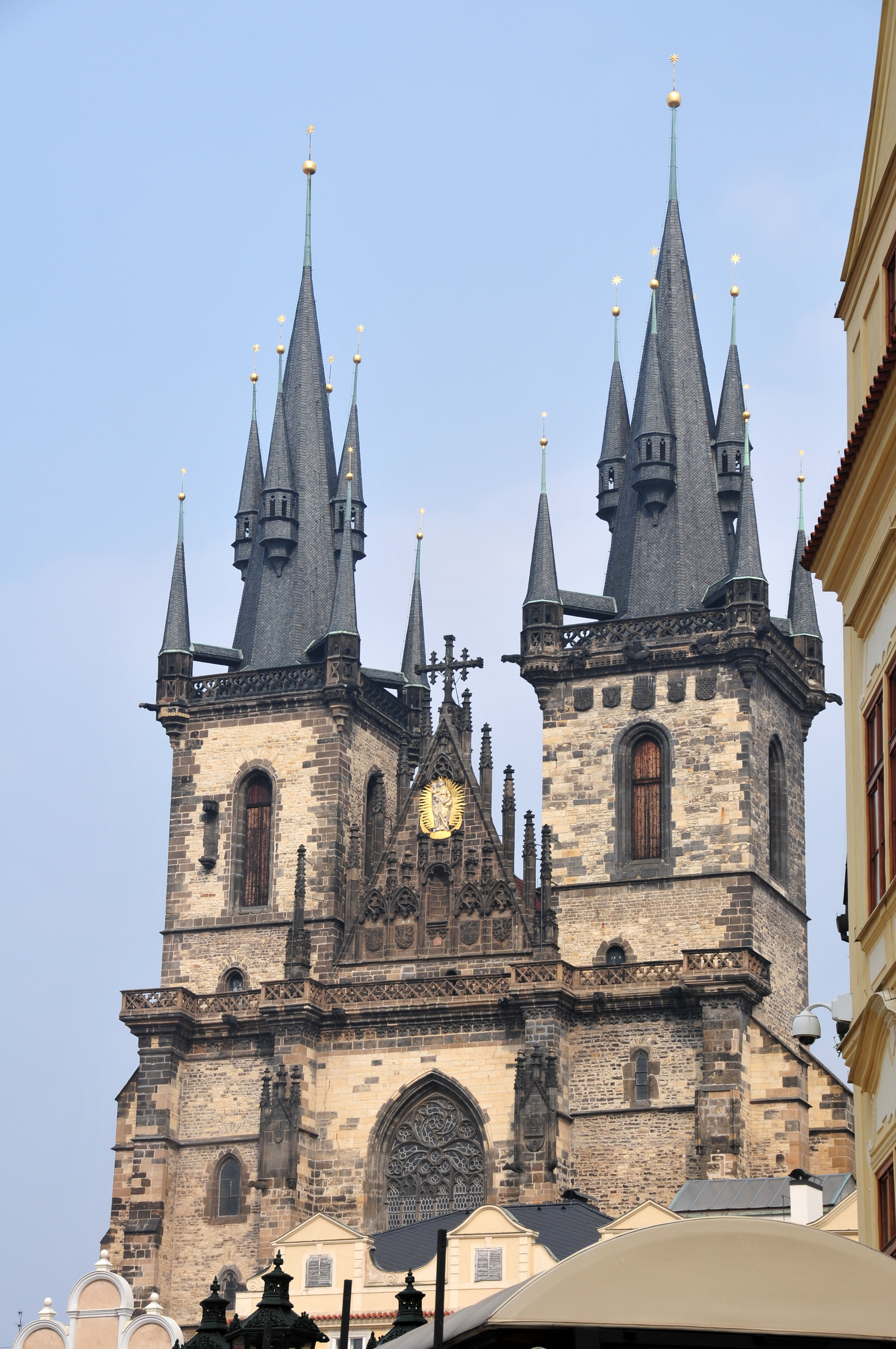 Prag